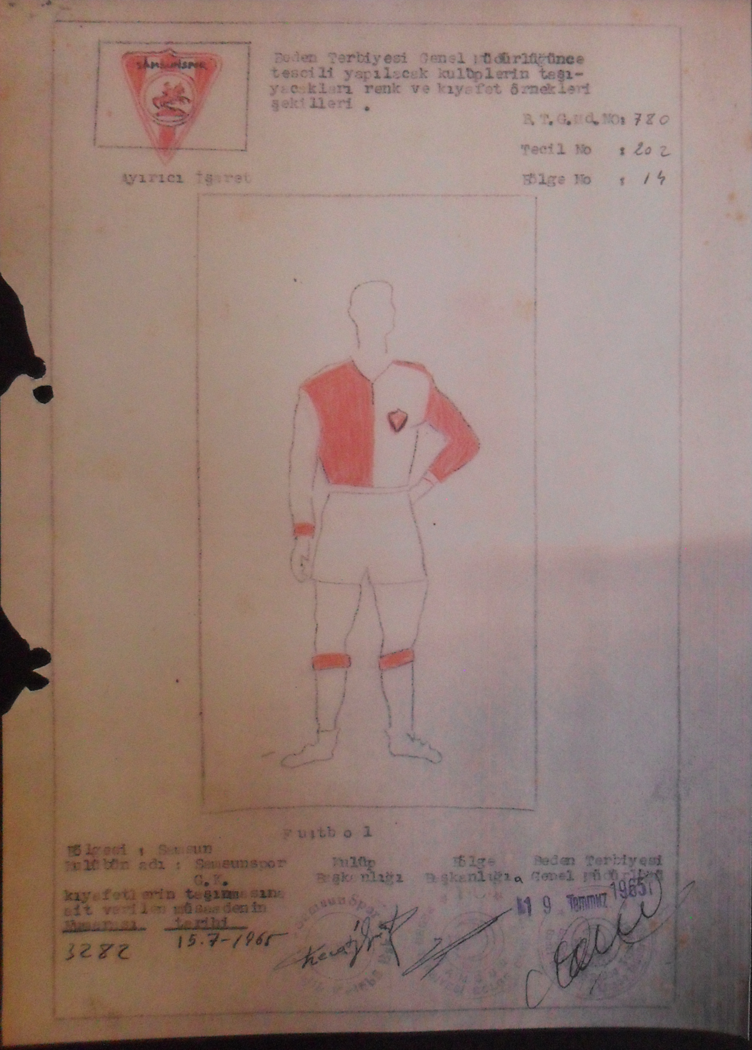 Samsun Kent Müzesi'nde sergilenen Samsunspor arma ve forma tescil fişi.